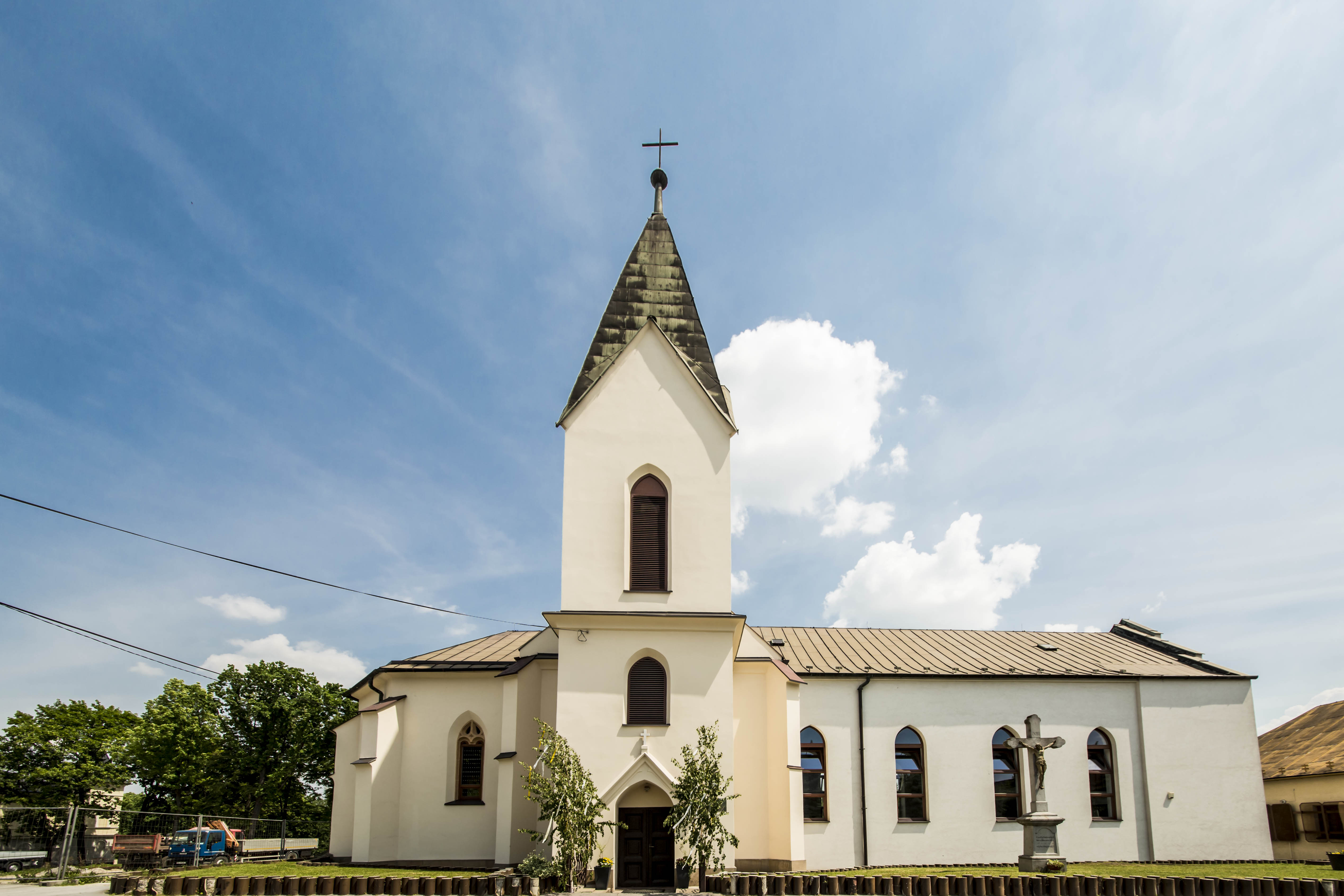 Kostol sv. Petra a Pavla_4_Barca